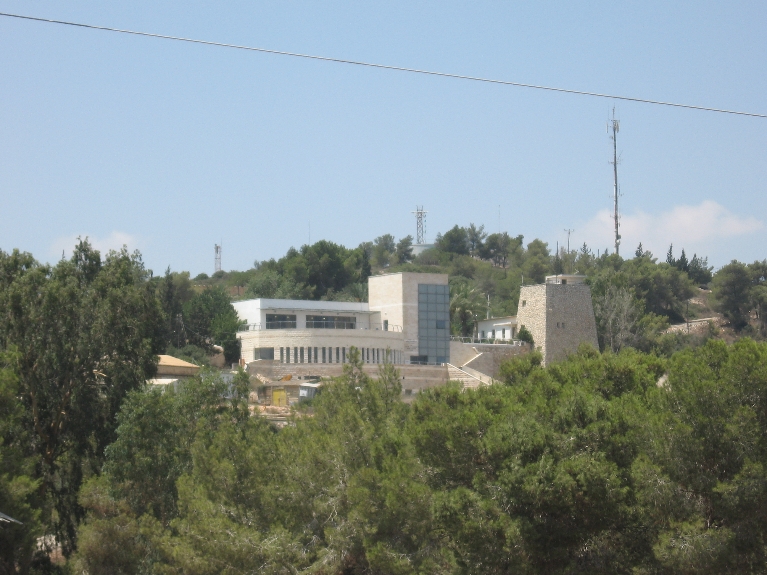 ישיבת מעלה גלבוע